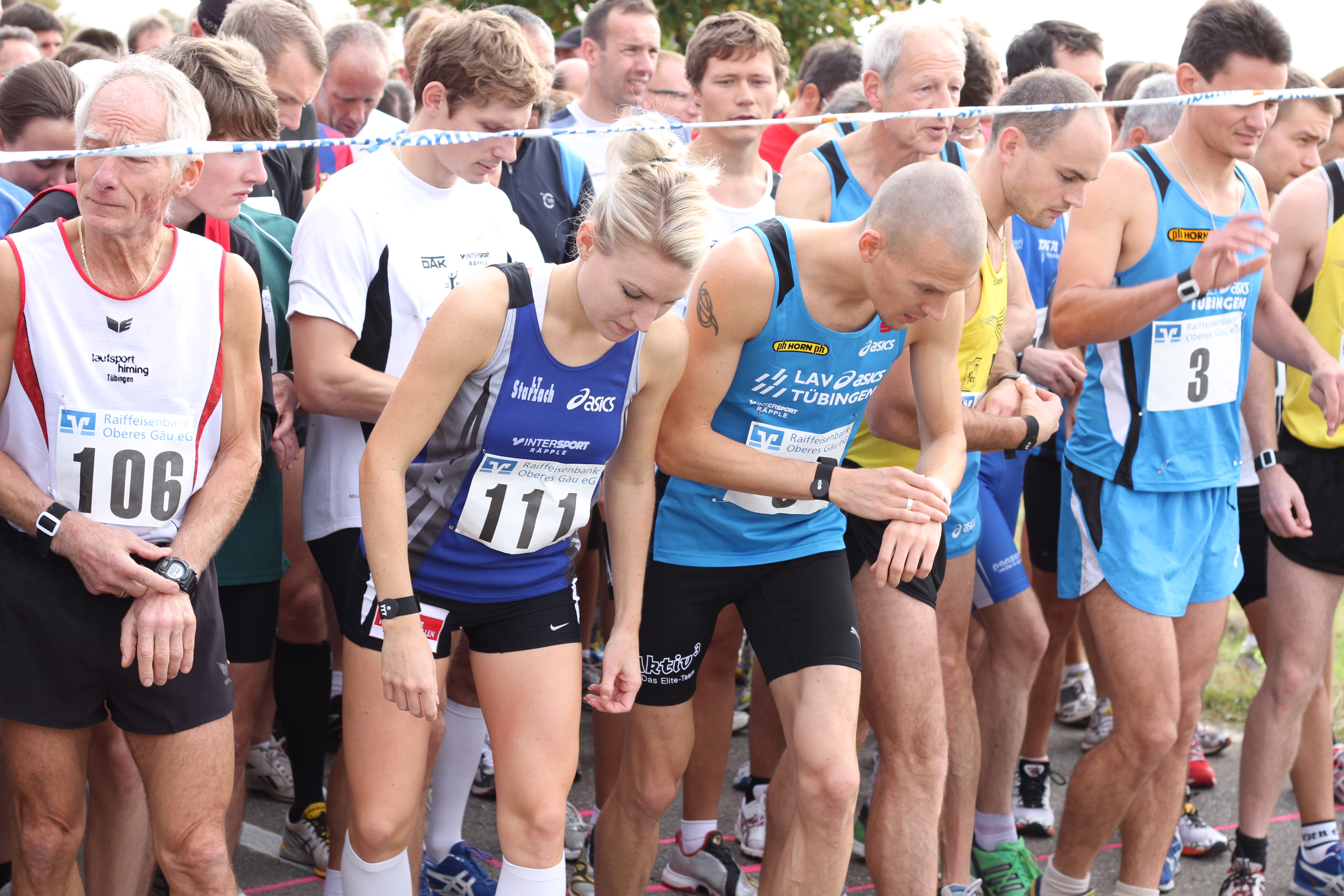 Judith Wagner Deutsche Meisterin im Sommerbiathlon (111) und links Werner Bauknecht (106) mehrfacher Deutscher Seniorenmeister